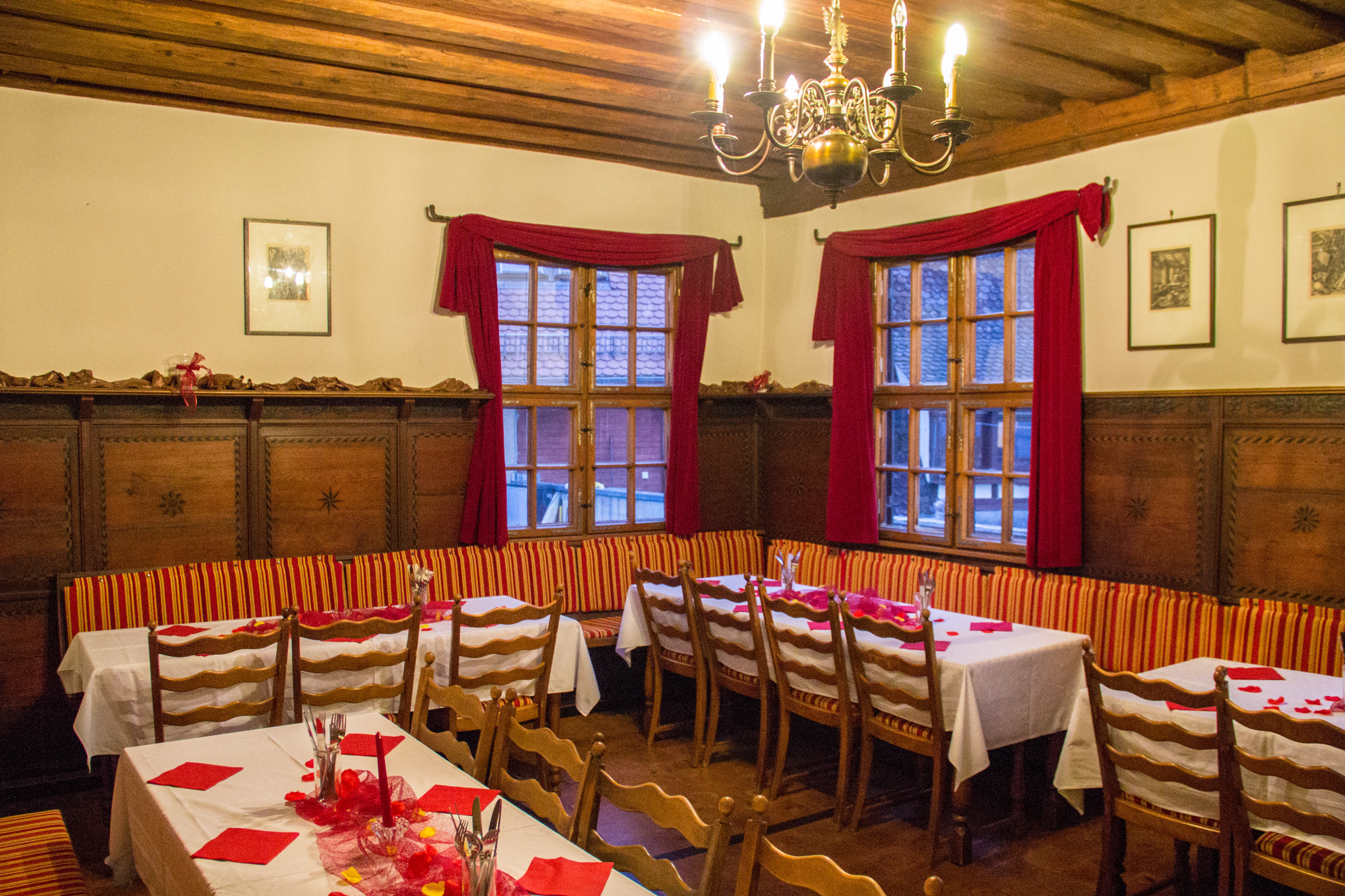 Pellerschloss, Fischbach